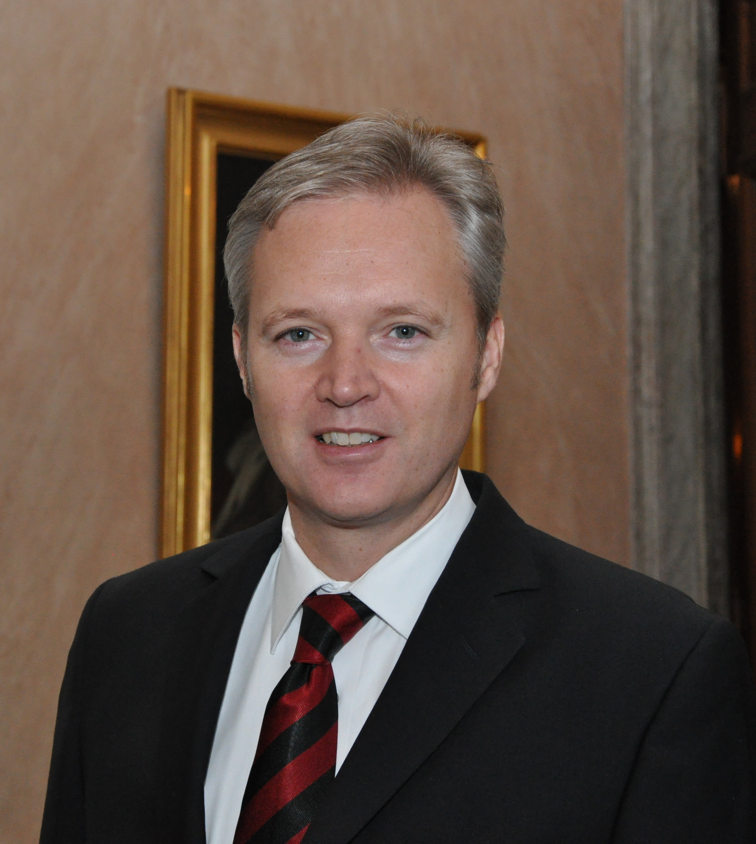 State visit to Stockholm, Sweden, 19-19-20-january-2011